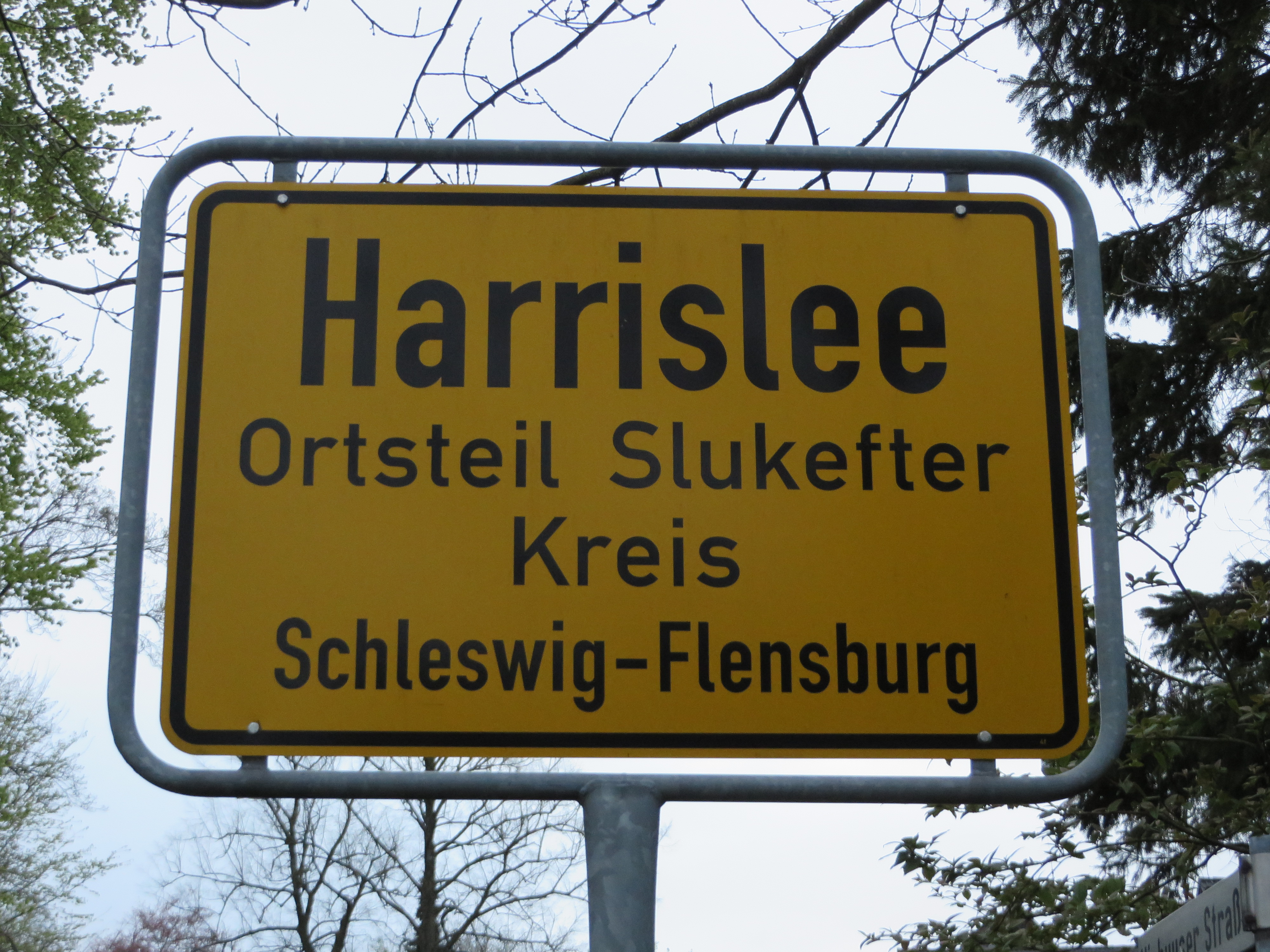 Ortsschild Harrislee, Ortsteil Slukefter